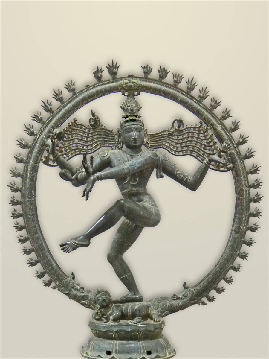 Hinduism god of arts and yoga hiva Nataraja, sous sa forme du Roi de la danse (Adavallane) (Danse cosmique qui crée et détruit l'univers dans un rythme infini) Vedaranyam XIIè siècle Dynastie des Chôlâ Bronze n°41 Rodin a estimé que cette figure de Shiva dansant était "la plus parfaite représentation du mouvement rythmique" Musée de Tanjore Rajaraja Museum, Thanjavur Article sur les bronzes Chola